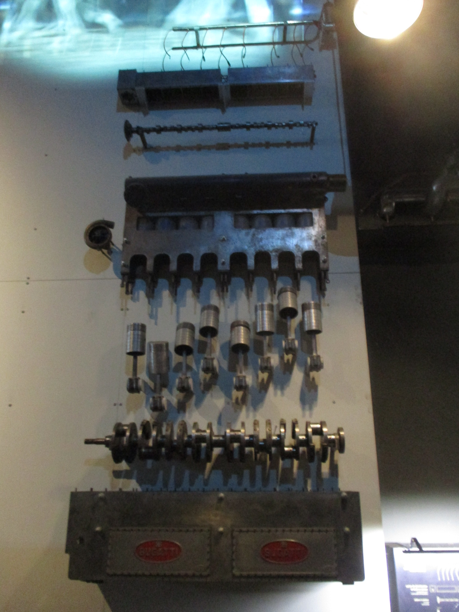 Moteur Bugatti Royale Type 41 ( 8 cylindre de 12,7 L ) Cité de l'automobile de Mulhouse